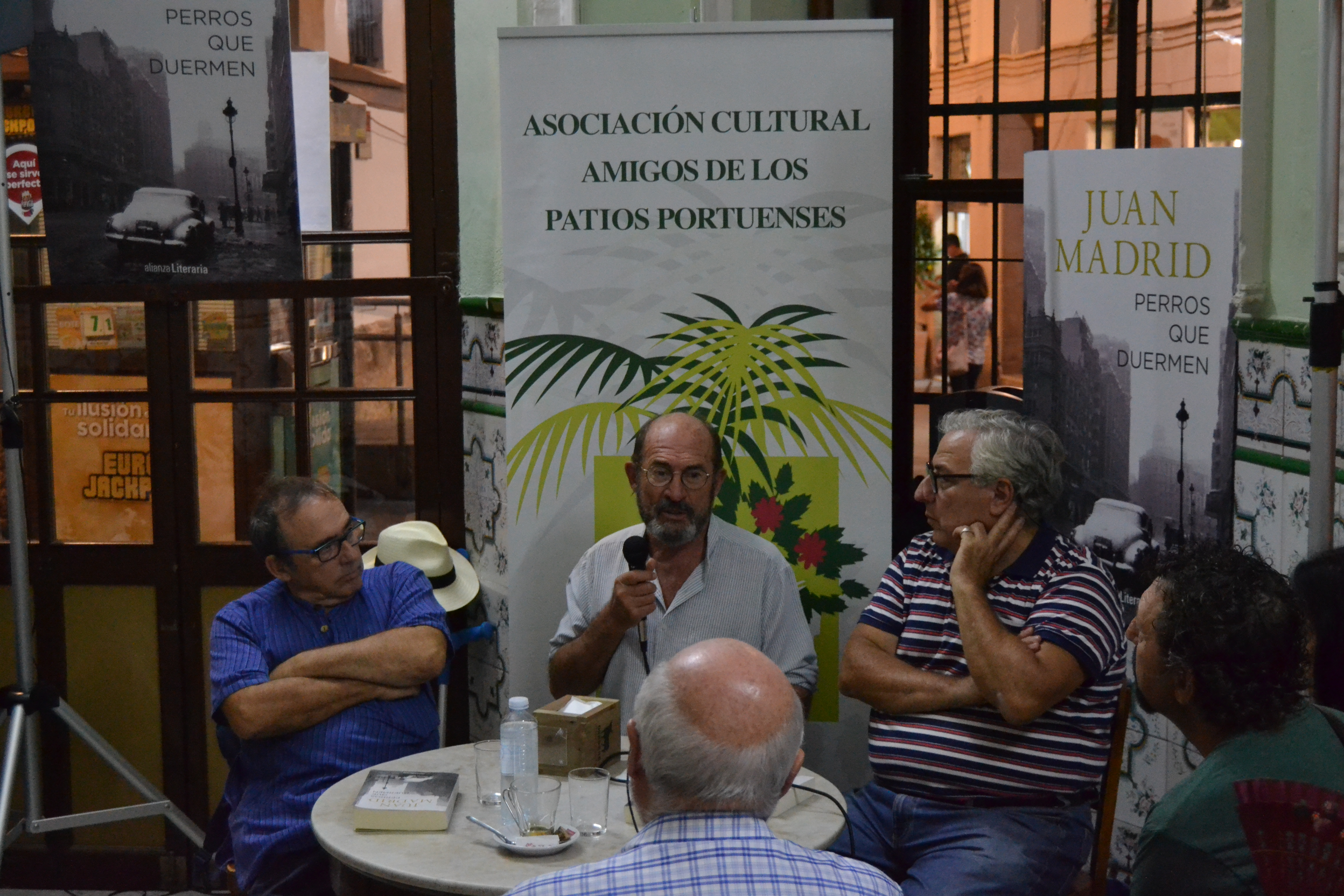 Presentación de la novela "Perros que duermen" de Juan Madrid. Los Jueves del Bar Vicente